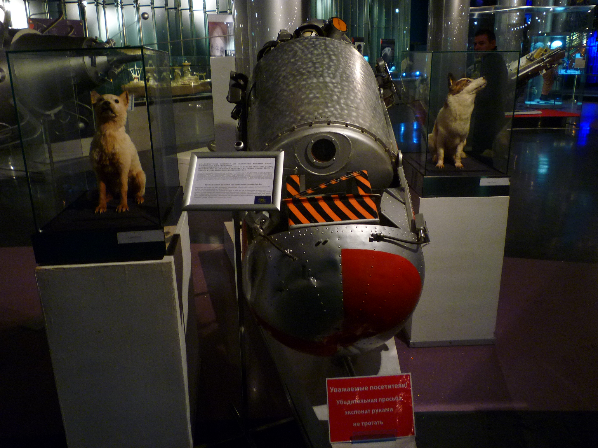 Belka e Strelka, le due cagnette che tornarono sane e salve sulla Terra dopo un volo orbitale